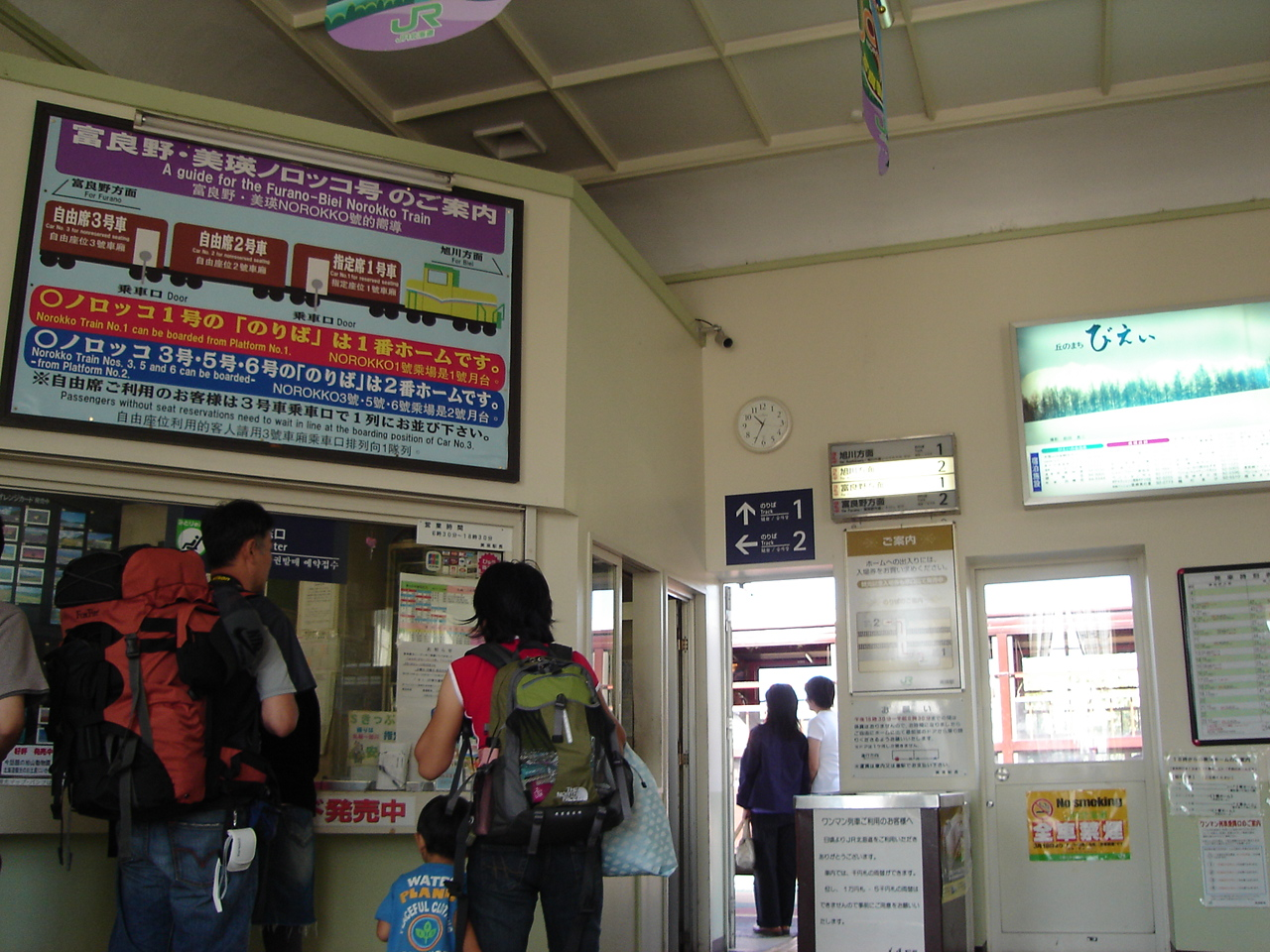 Biei Station, JR Hokkaido